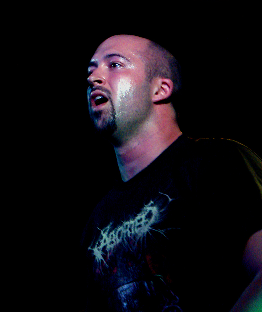 Benighted au Coolness'tival 2007, le 3/11/07 à Montdidier (60). Julien au chant.